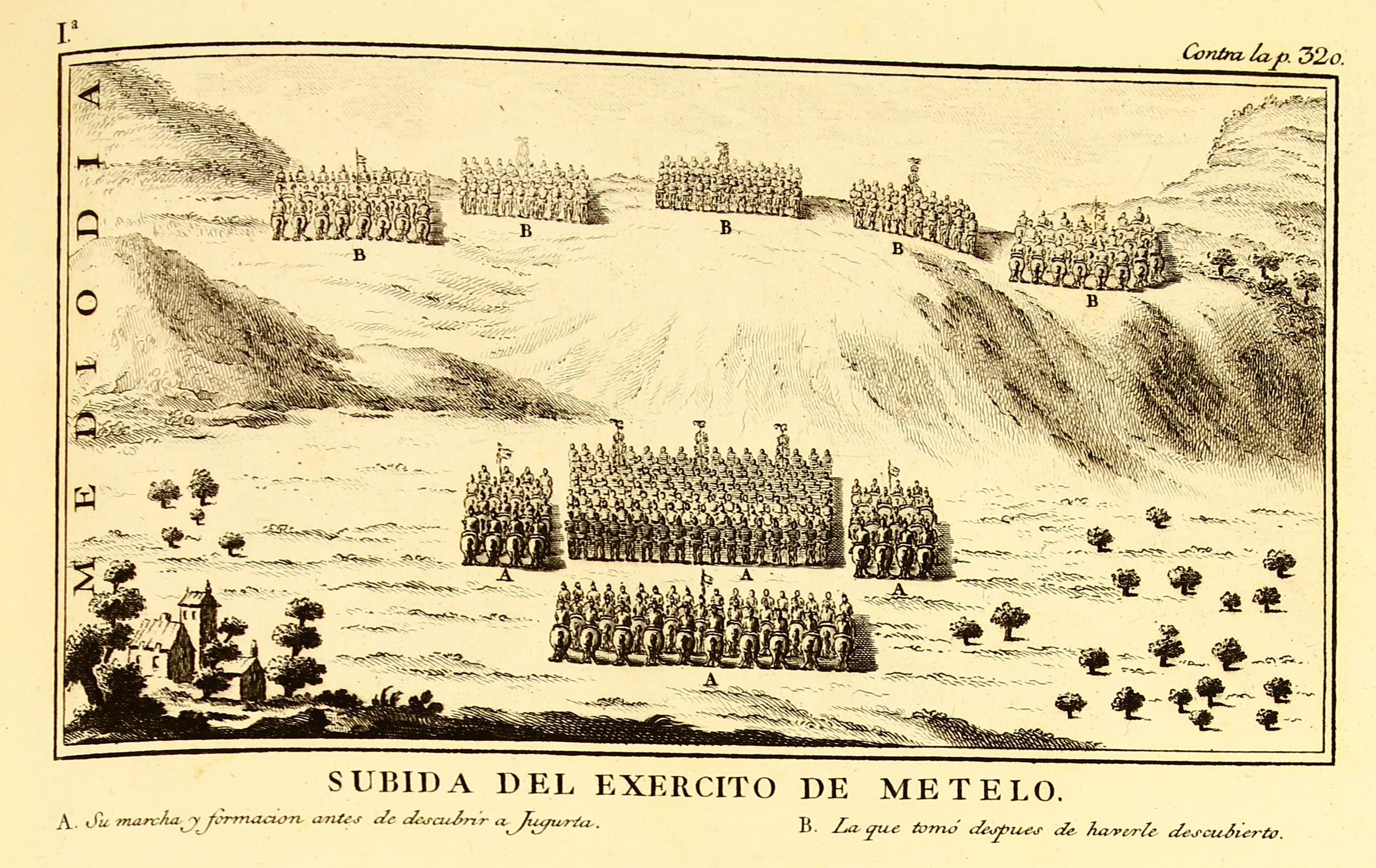 Autor: Salustio Crispo, Cayo, 0086-0035. a.J.C. Descripción bibliográfica: Bellum Catilinae. Español. - La conjuración de Catilina ; y la guerra de Jugurta/ por Cayo Salustio Crispo. - En Madrid : por Joachin Ibarra ..., 1772. - [20], 395, [1] p., [10] h. de grab.|b: il. ; Fol. - Contiene : De la vida y principales escritos de Salustio, en h. 2*4. Notas para la mejor inteligencia y justificacion de la version española de Cayo Salustio Crispo, p. 289-334. Del alfabeto y lengua de los fenices [sic] y de sus colonias, p. 335-378, con antep Materia: Roma - Historia - Siglo 01 a.J.C. - Fuentes Notas: Texto paralelo español-latín. - Tit. en antep.: Cayo Salustio Crispo en español. - El trad. de Salustio es el Infante D. Gabriel de Borbón y el trad. del Alfabeto fenicio es Francisco Pérez Bayer. - El pie de imp. consta en colofón. - Sign. : 2, *-2*4, A-Z4, 2A-2Z4, 3A-3C4, 3D2. - Port. grab. calc.: "E. Monfort inv. et inc.". - Las h. de grab. calc.: "M.S. Maella del., E. Monfort sculp." (retrato del autor), "Selma Delint et sculpt, "M-S. Maella inv., E.S. Carmona inc.", "M. Maella inv., J. Ballester inc.", "Fabregat del. et sc.", "F. Assensio inc.", "J. Anto Salvº Carmona delt et sculpt", "Carmona Iunior", "del. y grav. por D. Juan de la Cruz geografo ..." (mapa de Africa y Numidia antigua). - Las il. son grab. calc. "M.S. Maella inv. J. Ballester inc." en p. [1], "M.S. Maella invt. M.S. Carmona inc." en p. 96, "Maella invt. Carmona Inc." en p. 97 y en p. 288; varias il. en "Del alfabeto ...", también firmadas, sobre monedas Ilustrador: Maella, Mariano Salvador, 1739-1819 il. Ilustrador: Salvador Carmona, Manuel, 1734-1820 il. Ilustrador: Salvador Carmona, Juan Antonio, il. Lugar de impresión: España. Madrid Localización: Vea la ilustración en su contexto Libro completo en pdf